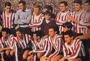 Estudiantes, la tarde que derrotó a Racing Club en la final del Metropolitano 1967. Arriba: Pachamé, Poletti, Malbernat, Aguirre Suárez, Madero y Hugo Spadaro; abajo: Ribaudo, Bilardo, Conigliaro, Juan Miguel Echecopar y Juan Ramón Verón.